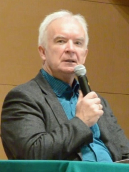 Marian Zacharski, oficer wywiadu.